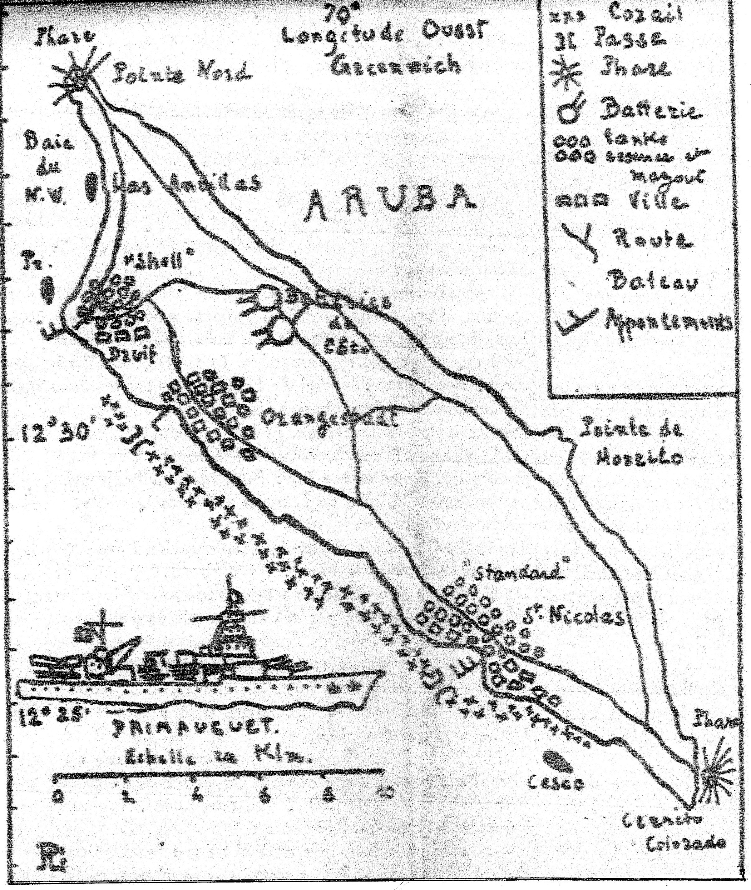 Scan par Henri Goybet du croquis de débarquement par son Grand père Pierre Goybet , alors capitaine de Vaisseau à Aruba aux Antilles en mai 1940 avec le corps de débarquement du croiseur Primauguet pour défendre les dépôts pétroliers de la Shell et de la Standard Oil contre de possibles attaques Allemandes